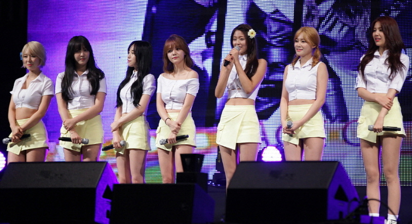 AOA 홍천 군인의날 화합한마당 part.2